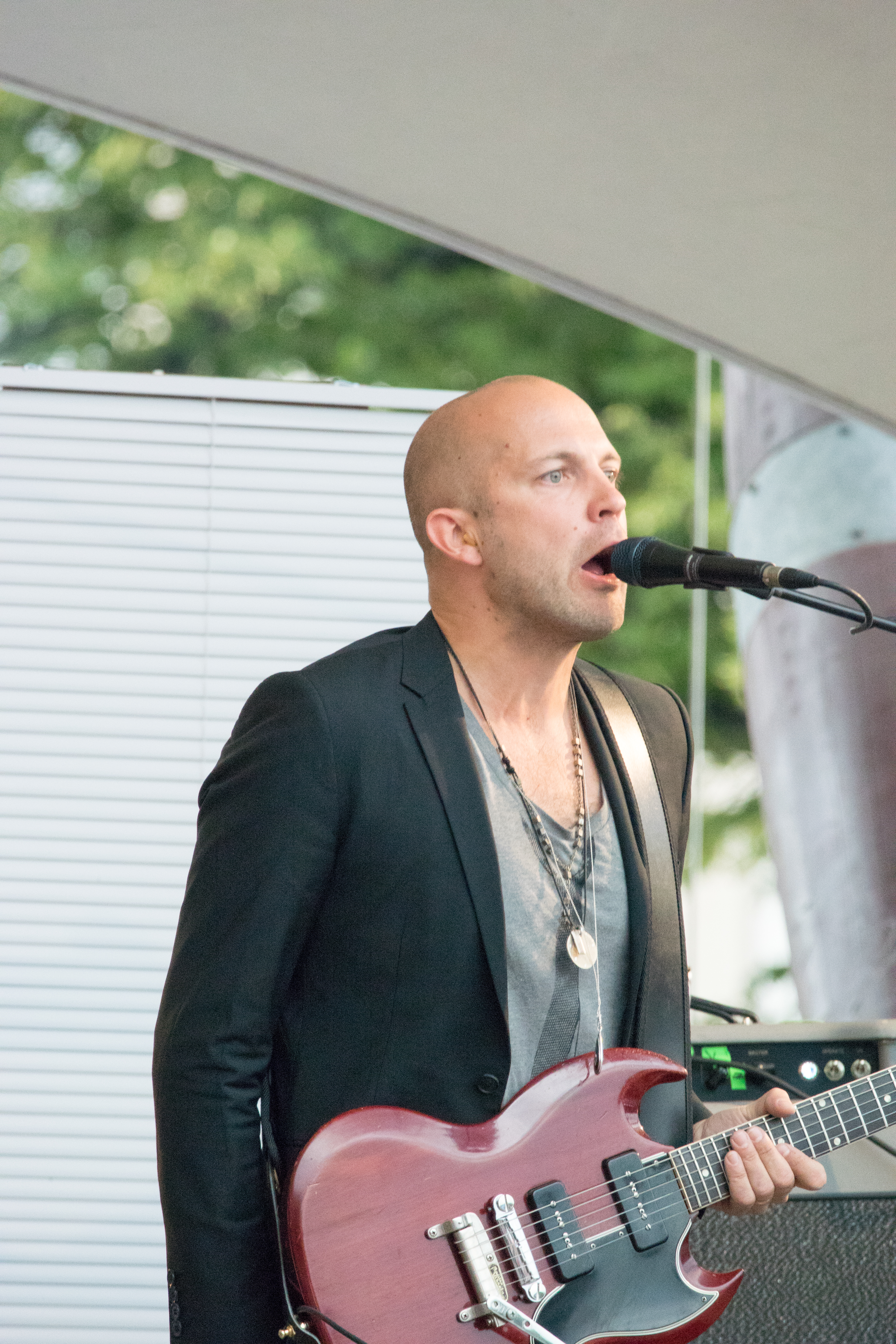 Mikko Kosonen suomalainen kitaristi